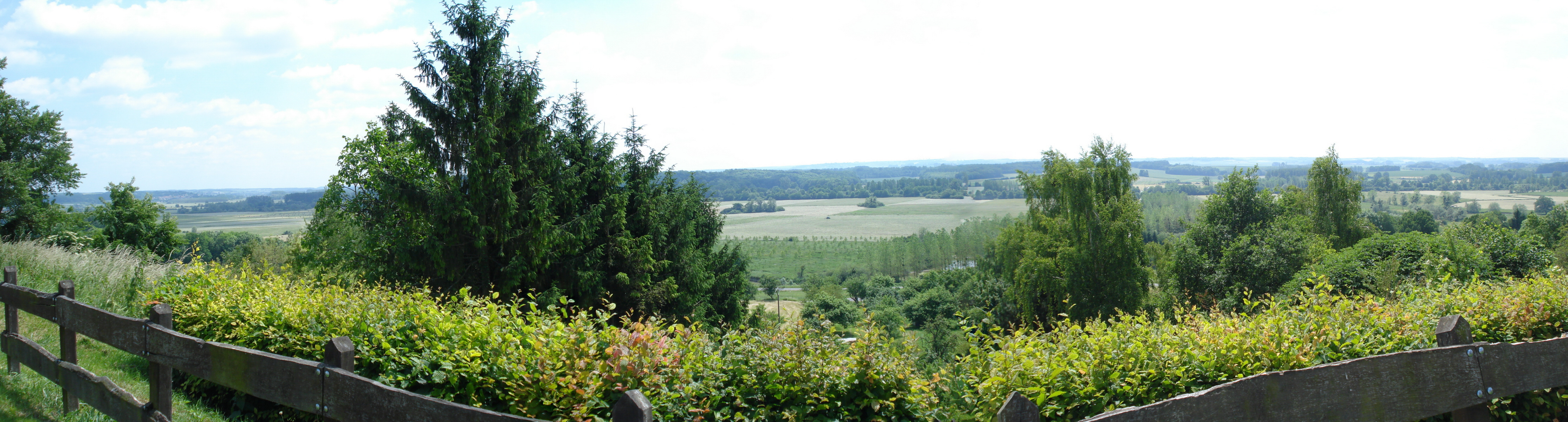 panorama à Voncq, composé de 3 foto's